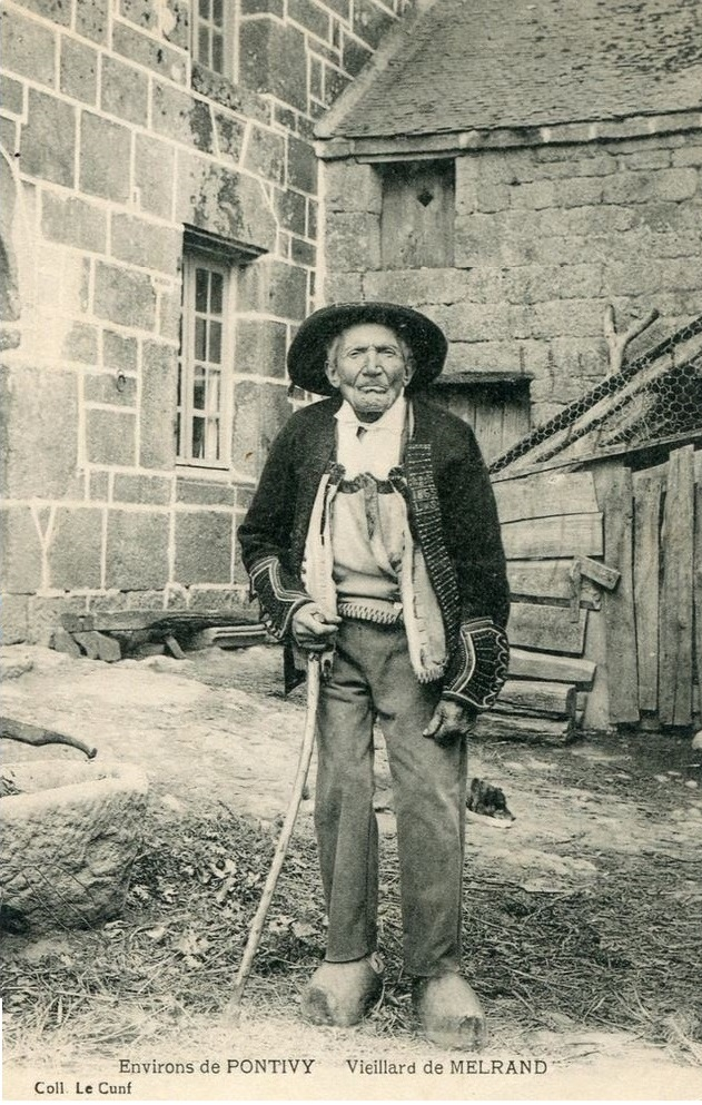 Carte postale éditée par Le Cunff.